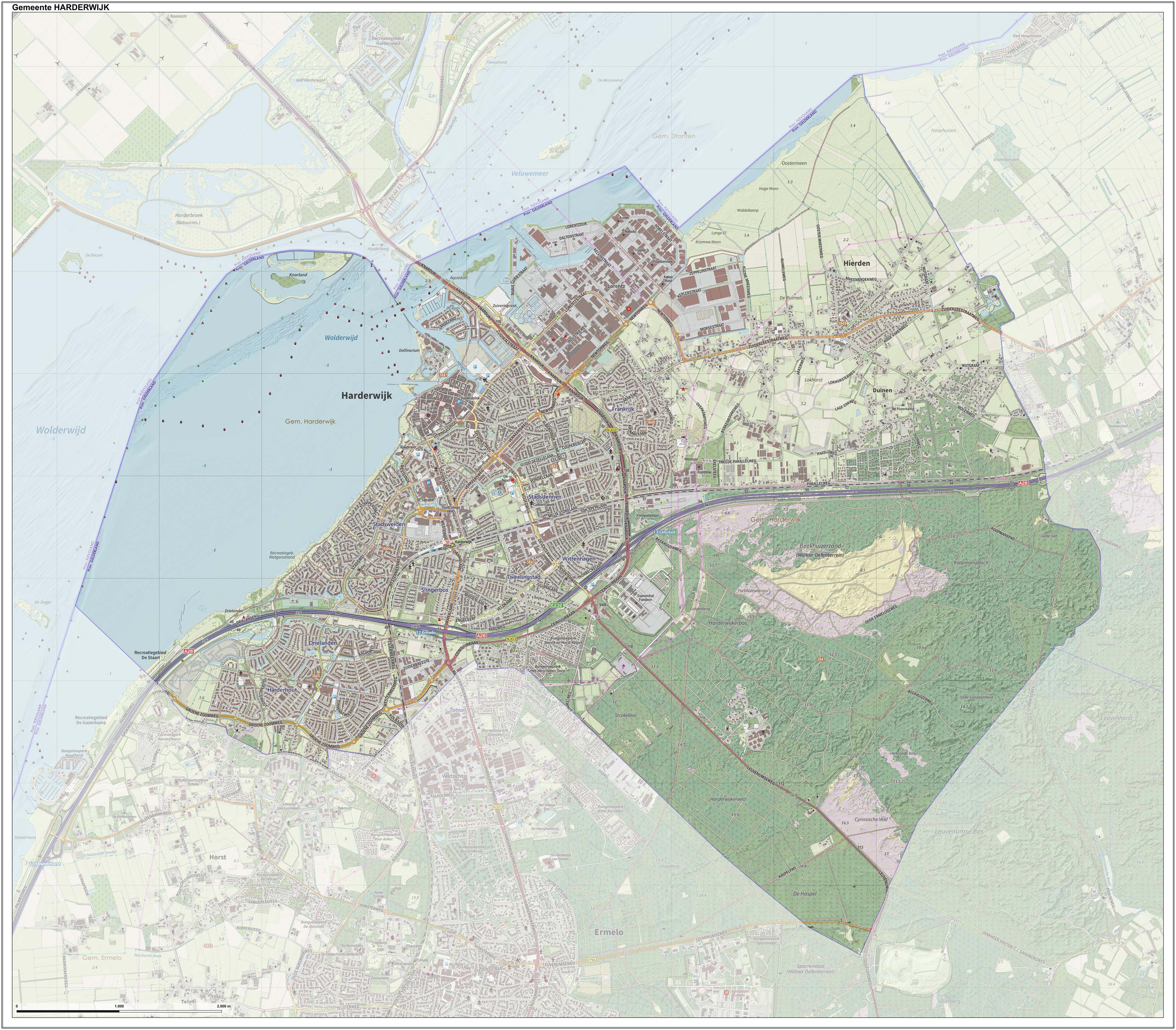 Topografische gemeentekaart. Resolutie: 400 pixels/km. Kaartbeeld samengesteld uit de open geodata van de Top10NL en Top25namen (Kadaster), Creative Commons-BY licentie. Gebouwvlakken uit open geodata BAG extract. Wegen uit de OpenStreetMap, OpenStreetMap community. Reliëfschaduw uit de Actuele Hoogtekaart AHN2. Samenstelling en kleurenschema: Jan-Willem van Aalst, met QGIS. Zie ook de Legenda.